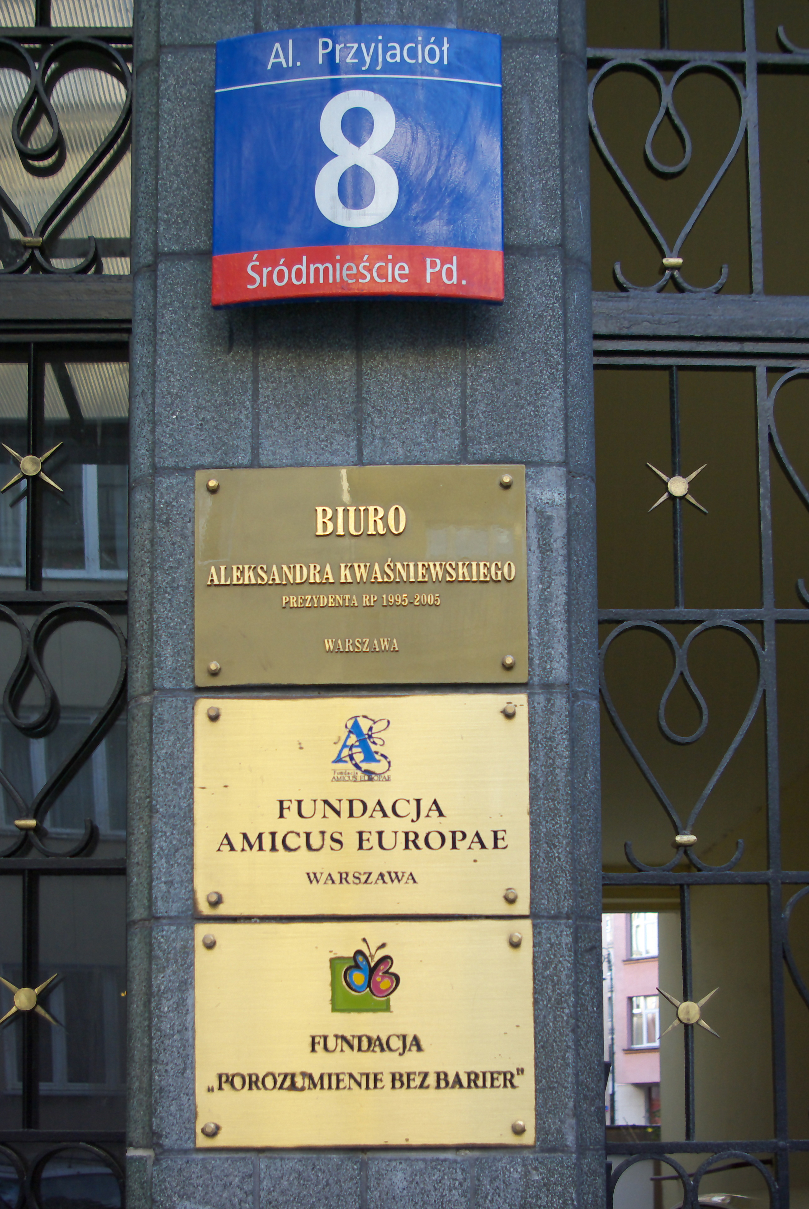 Aleja Przyjaciół 8 w Warszawie. Biuro Aleksandra Kwaśniewskiego. Fundacja Porozumienie bez Barier, Amicus Europea